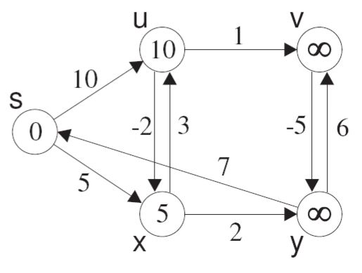 BellmanFord2